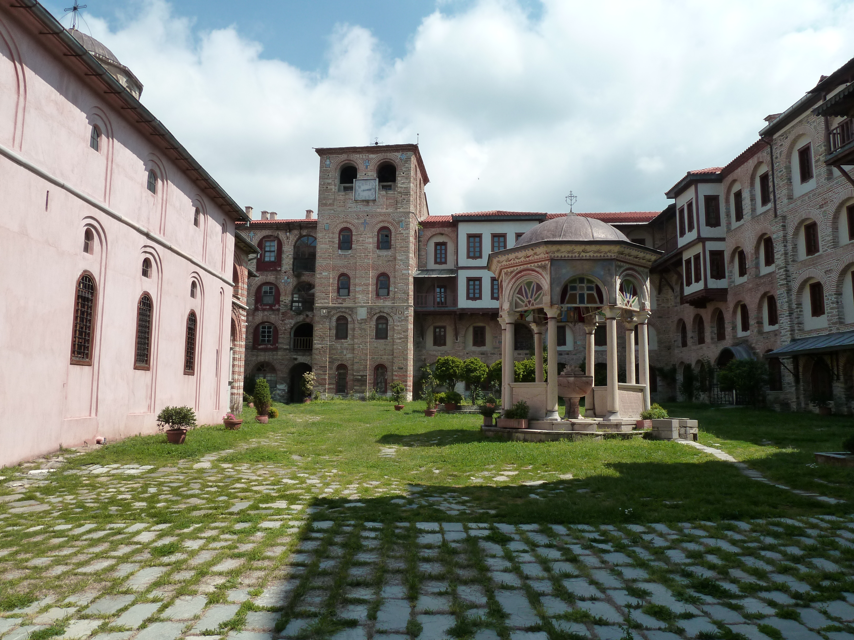 Cour intérieure du monastère de Xeropotamou (Mont Athos)